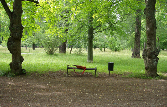 Engelska Parken official Promotion Picture, Karl Eriksson